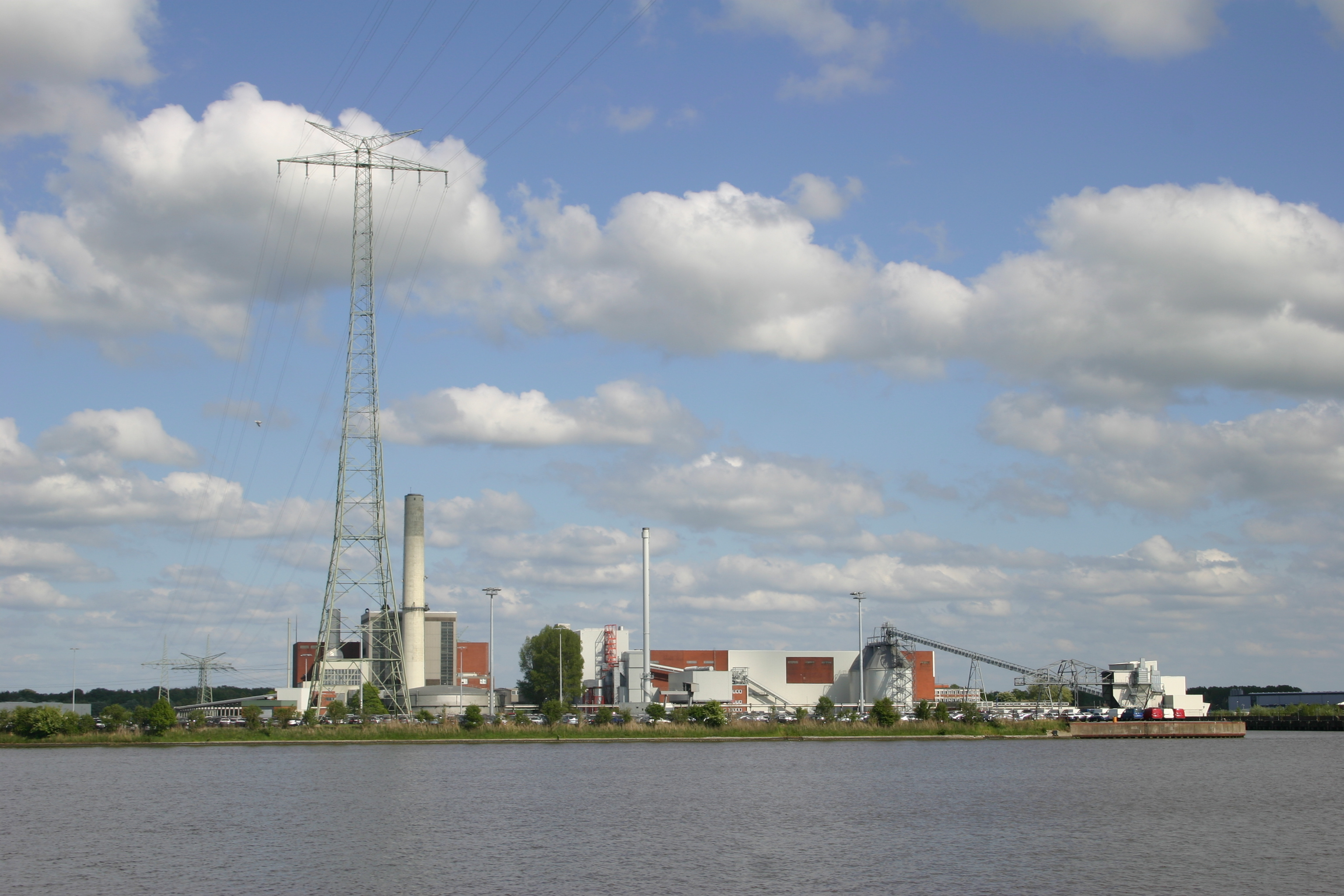 Kraftwerk in Emden, Ostfriesland, Niedersachsen, vom Hafen aus gesehen; links 110-kV-Freileitung UA Emden/KW–UA Emden/West (Freileitungskreuzung Emder Hafen)